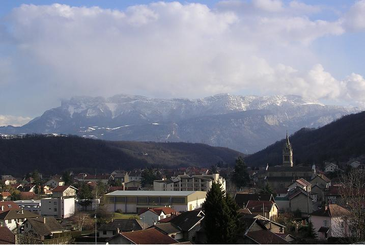 Renage Centre